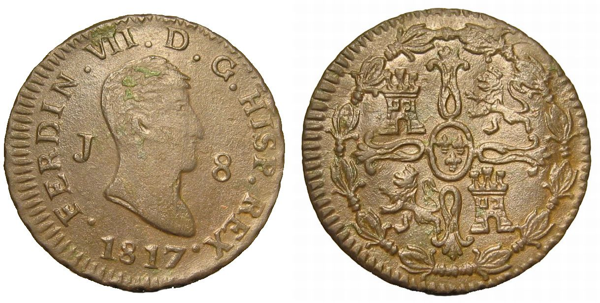 8 Maravedíes de Fernando VII. Anverso: FERDIN.VII.D.G.HISP.REX. 1817. Efigie del rey con Marca de ceca (J de Jubia, A Coruña) y Valor (8). Reverso: Escudos de Castilla y León. En el centro flores de Lis de los Borbones.